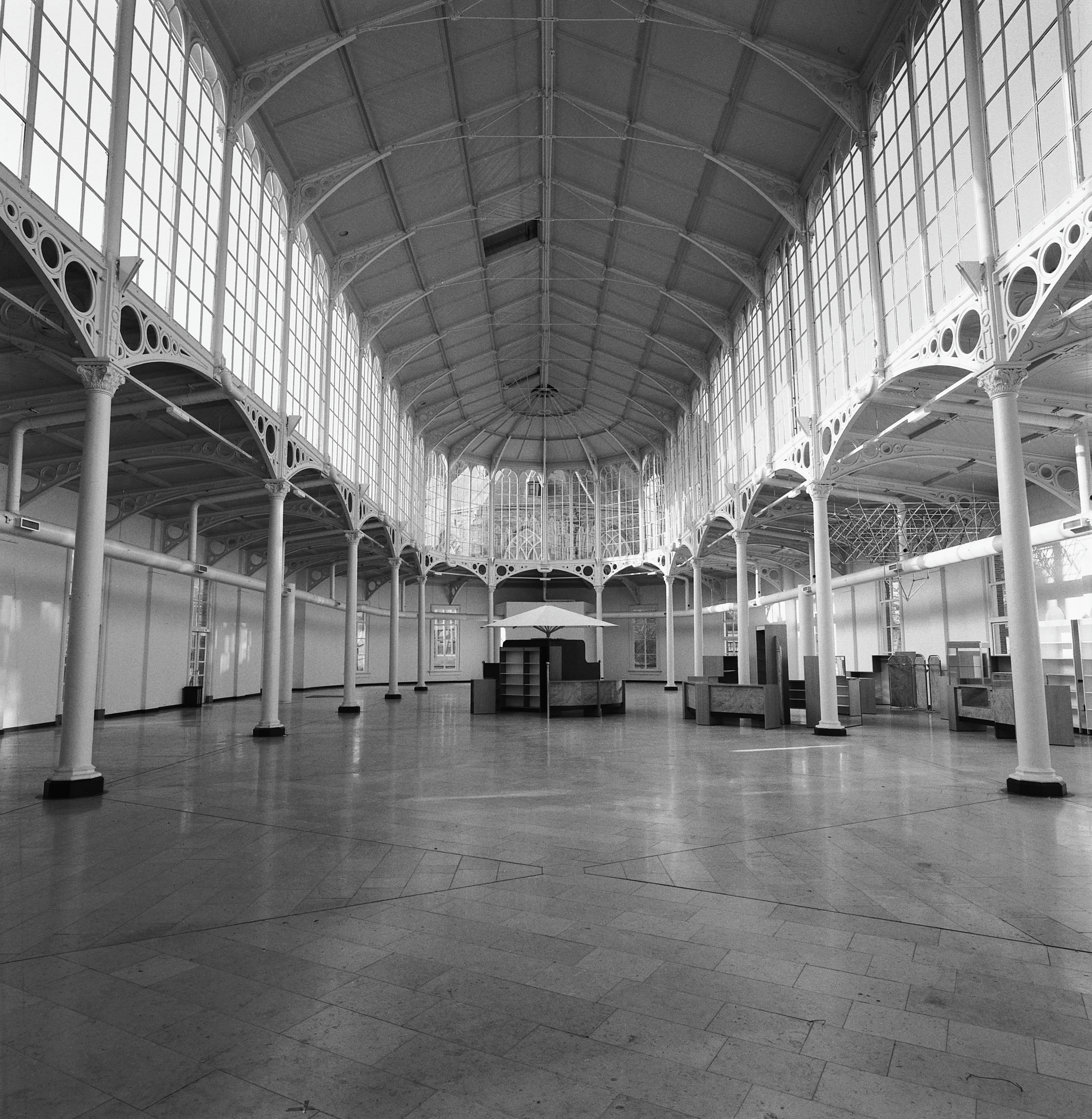 KORENBEURS: INTERIEUR, OVERZICHT